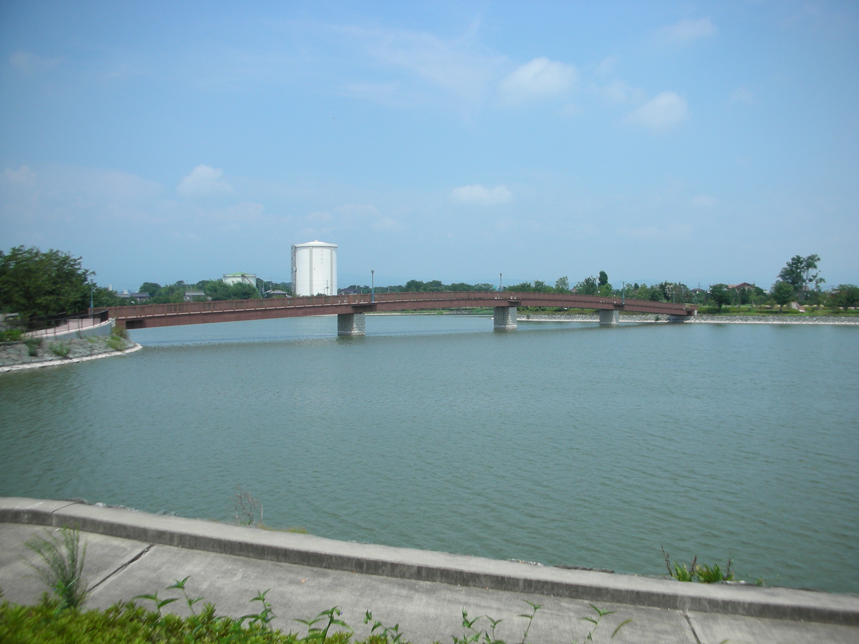 波志江下沼の外観。